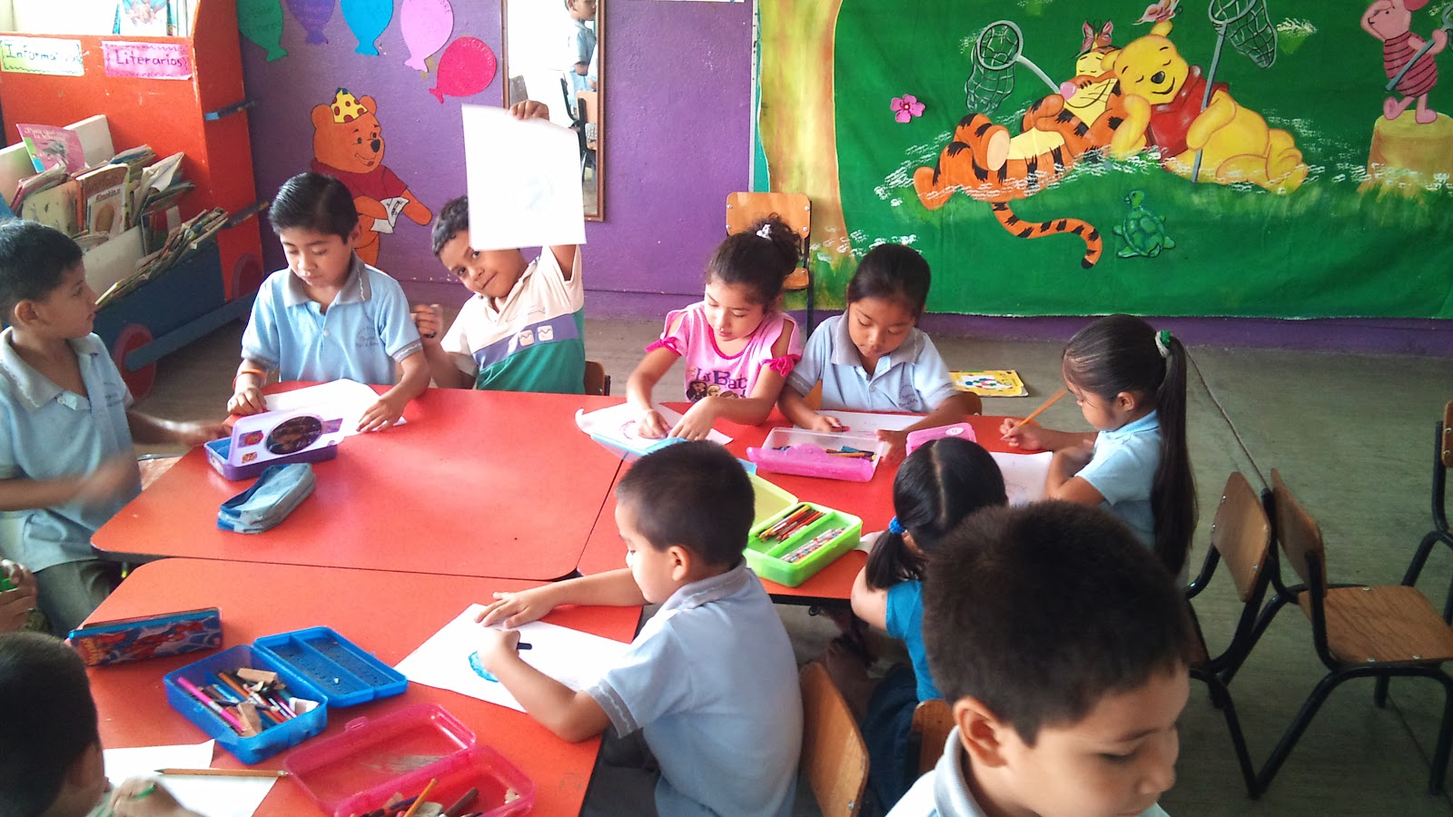 Educar a los alumnos, mediante Proyectos Didácticos ambientales